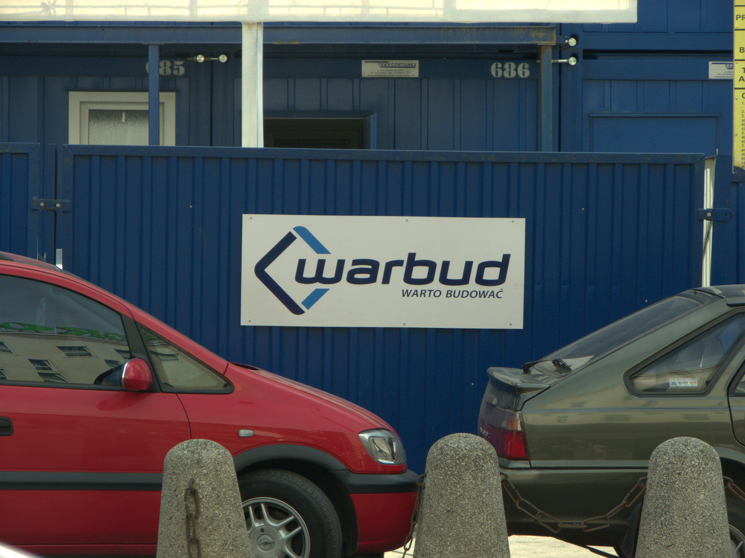 Warbud